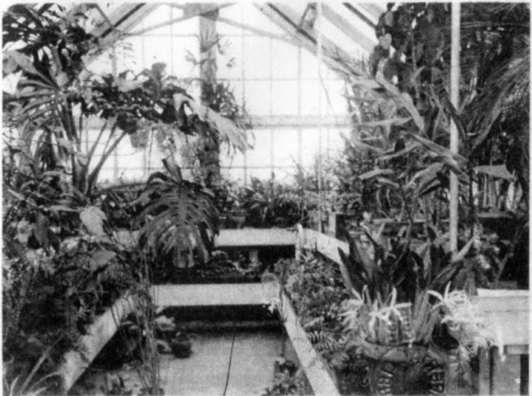 説明文に「古今東西に亘る各種の生薬植物の標本、熱帯植物の繁茂せる、二棟の温室、内外各国の薬草を栽培せる薬草園が完成し、而して薬学は実習を重視し故に薬学各分科の実習室として分析化学、顕微鏡、衛生化学、微生物学、薬化学、薬品製造学、裁判化学、電気化学、薬品鑑定、調剤学等の各実習室があり、其他図書閲覧室、製図室、動物飼育室、天秤室の設備もあり、尚製薬工場もあり、最新の製薬機械が備付けられて日々運転して居る」とあり